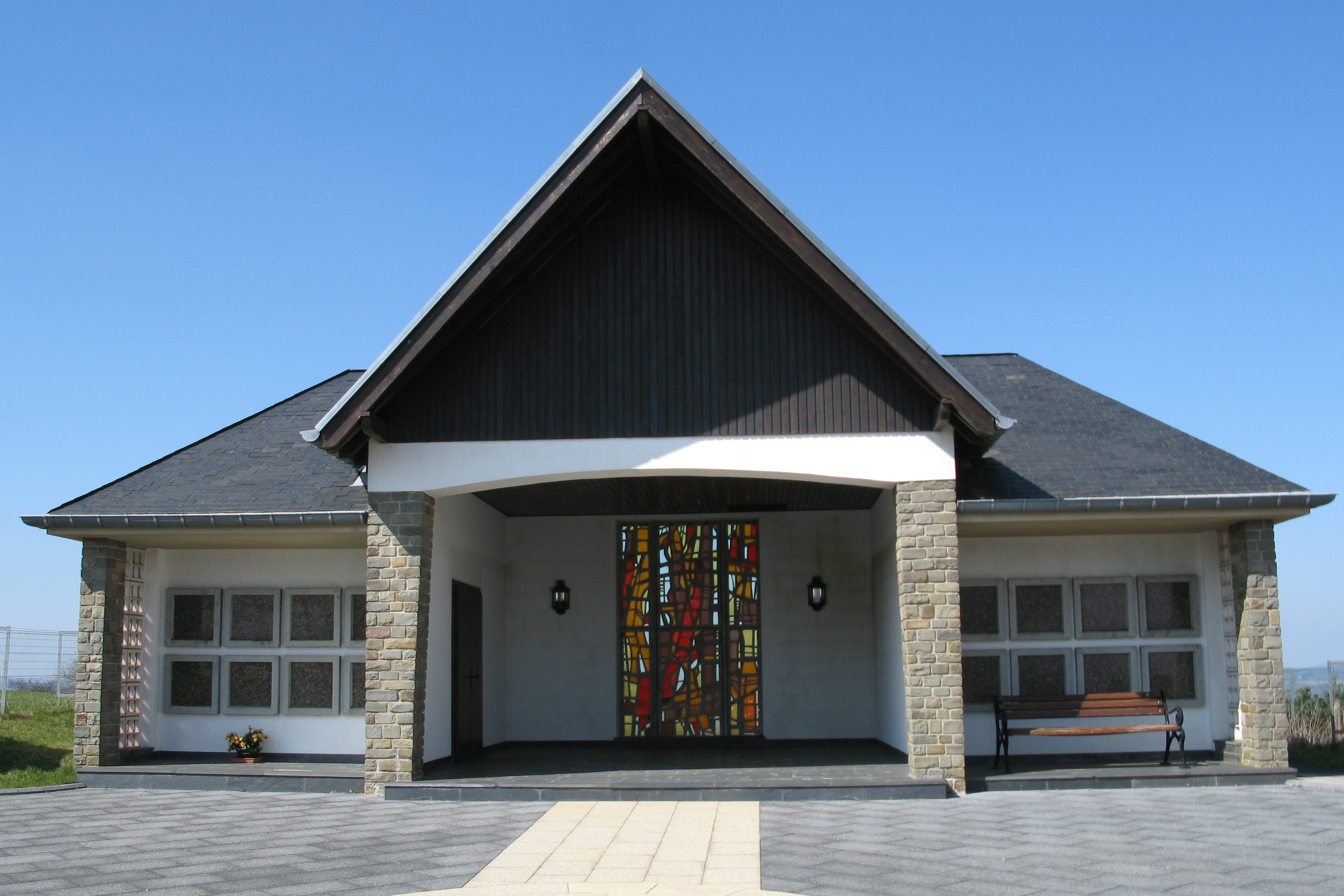 Kolumbarium zu Gréiwels Kategorie:Reliéis Gebaier zu Lëtzebuerg Kategorie:Gemeng Groussbus